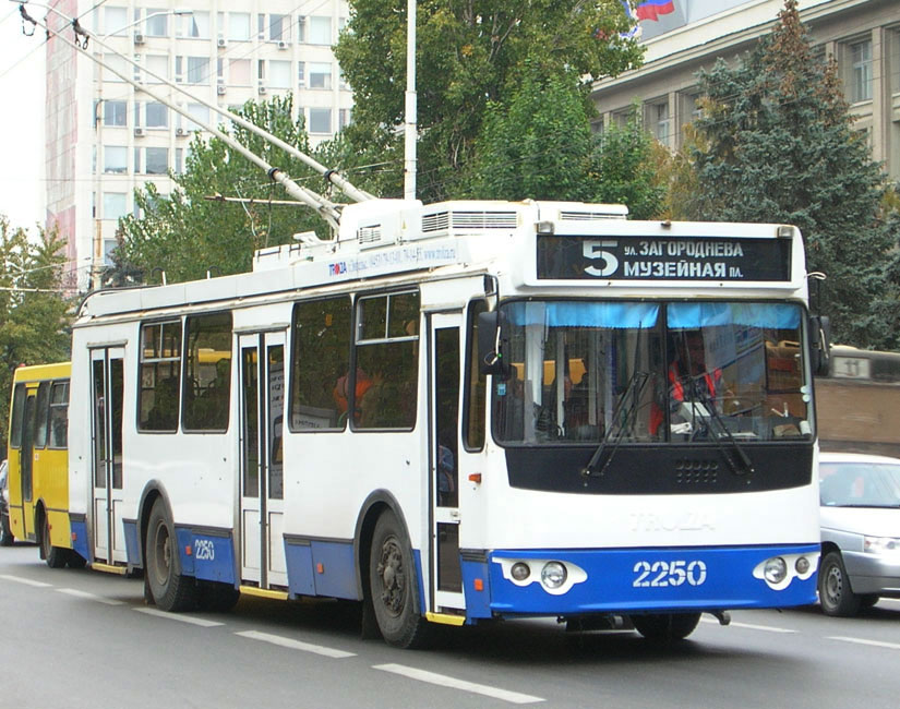 Троллейбус с б/н 2250 на маршруте № 5 (г. Саратов, Россия).